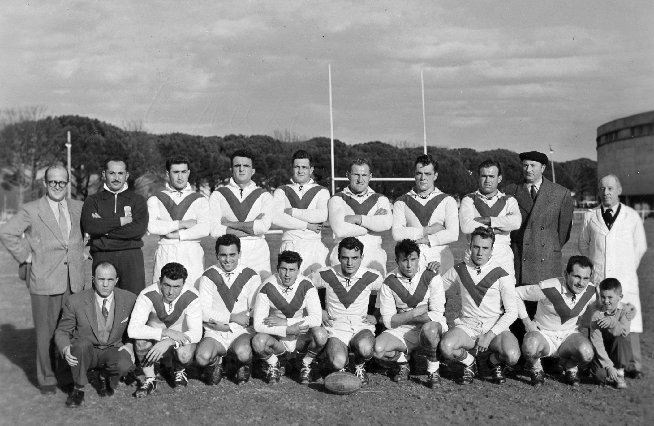 Terrain de rugby à côté du Stadium municipal de Toulouse, 1bis allées Gabriel-Biénès. 6 décembre 1952. Photo de groupe de l'équipe Toulouse Olympique XIII (rugby à XIII) avec le staf technique ; en arrière-plan on aperçoit une partie du Stadium. 1ère rangée, à droite, Vincent Cantoni. Observation: Même cliché que le 53Fi503.